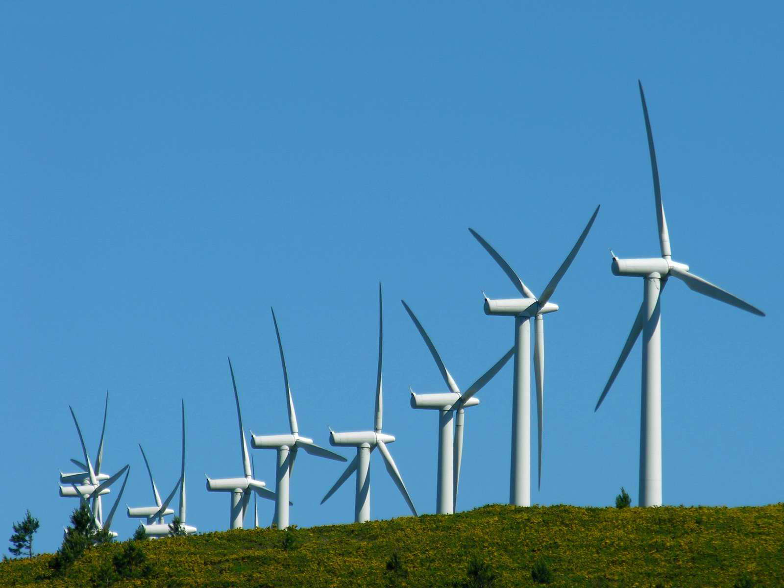 self made. Aeroxeneradores en Carnota, Galicia